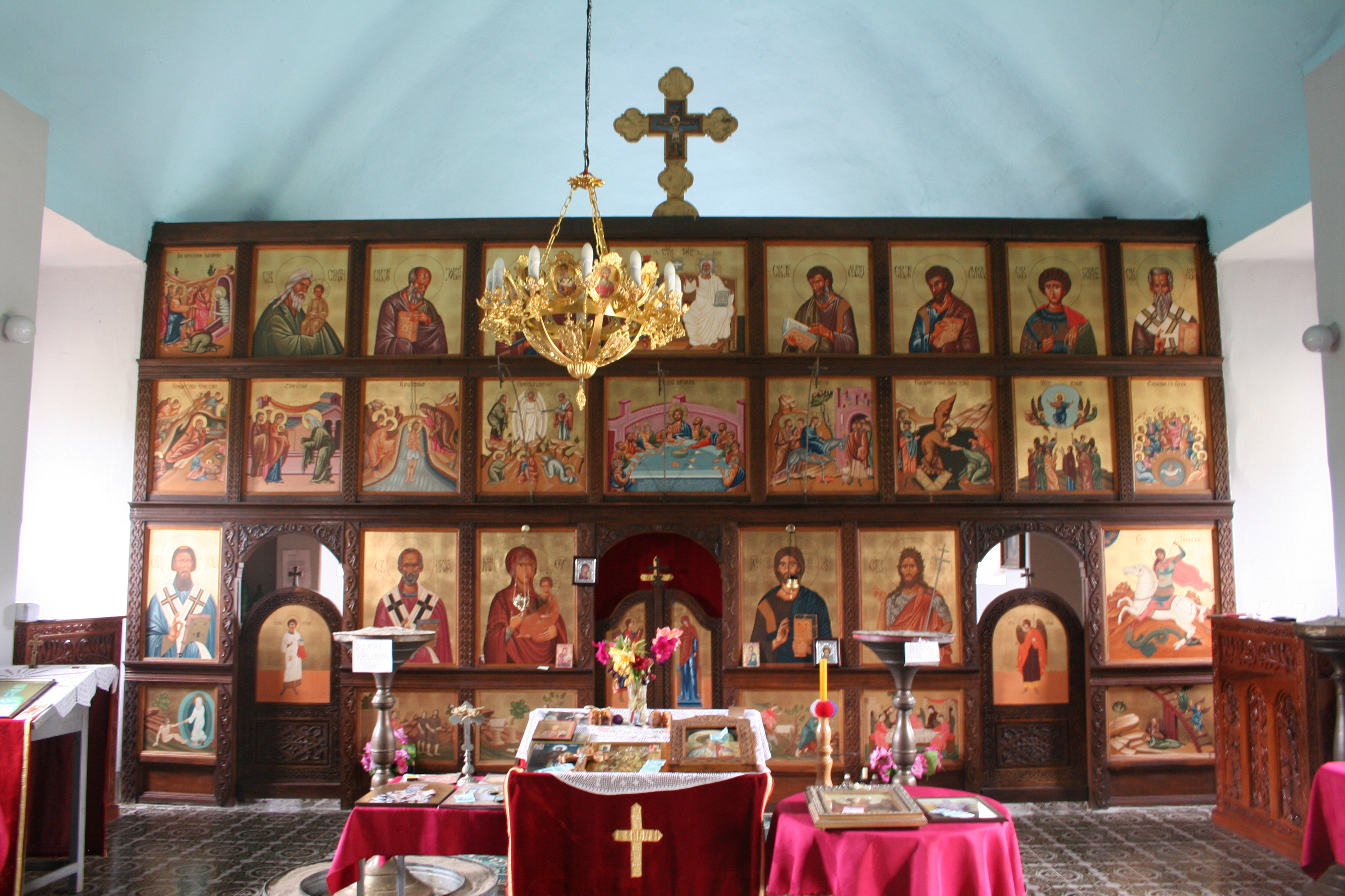 Crkva Sv. Stefana, Svileuva